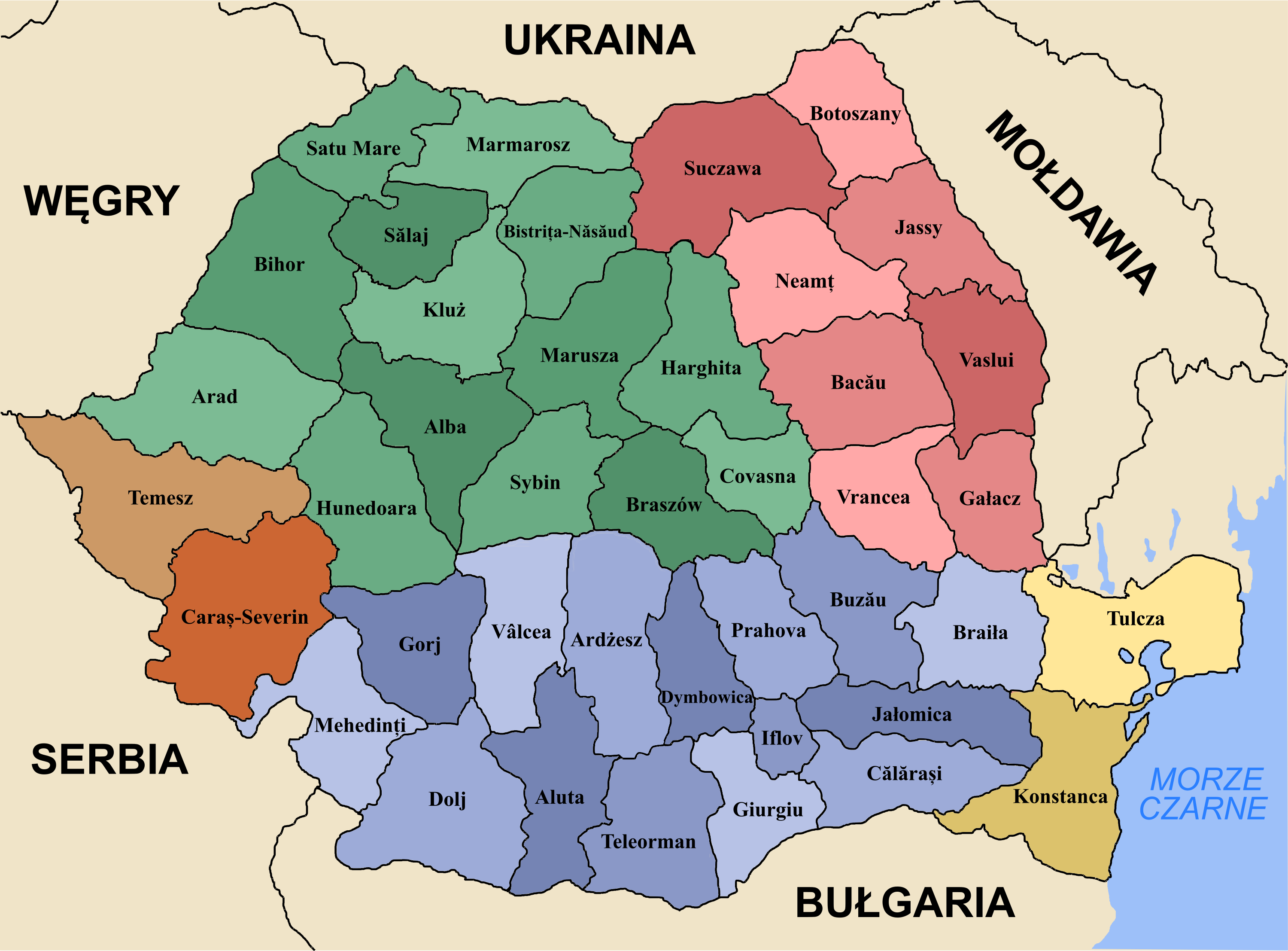 Mapa przedstawia Rumunię wraz z państwami sąsiednimi, jej okręgami oraz podziałem na krainy historyczne.